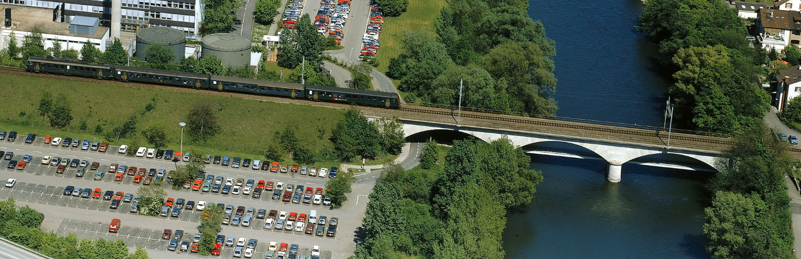 Steinbogenbrücke der SBB-Linie 710 (Turgi-Koblenz-Waldshut) über die Limmat in Turgi, gebaut 1859 von Locher & Naeff für die Nordostbahngesellschaft, Aufnahme von 1989 mit RBe 4/4-Zugskombination (vom Author bearbeitet).